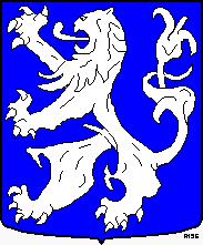 Gemeentewapen Heemskerk